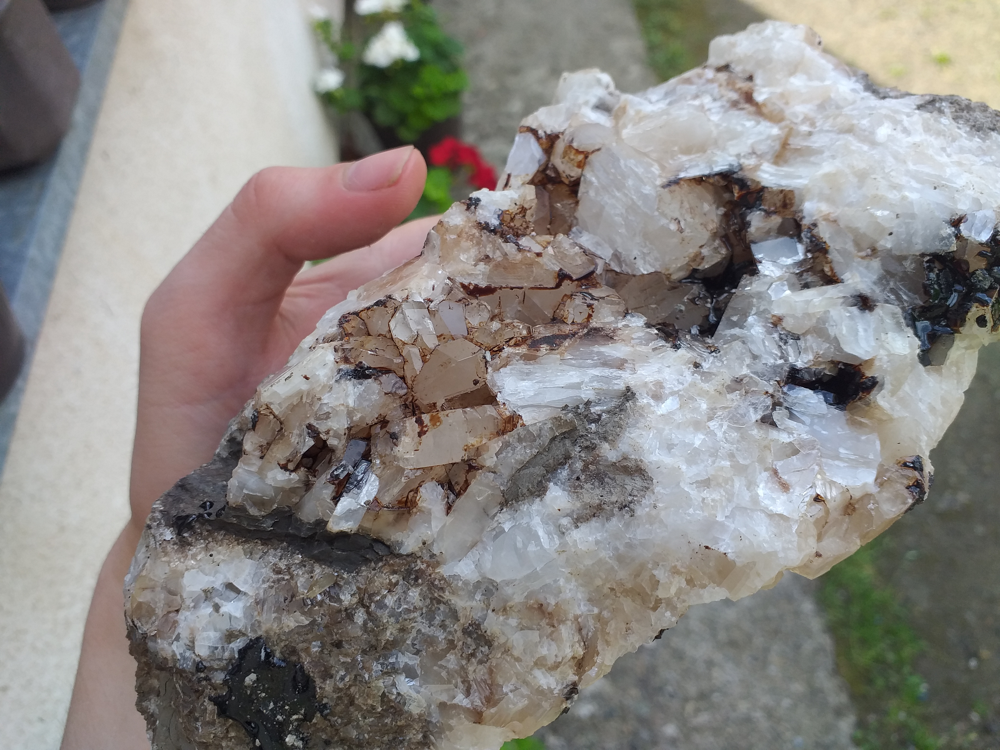 Борни минерали из јаме Побрђе у Балјевцу.